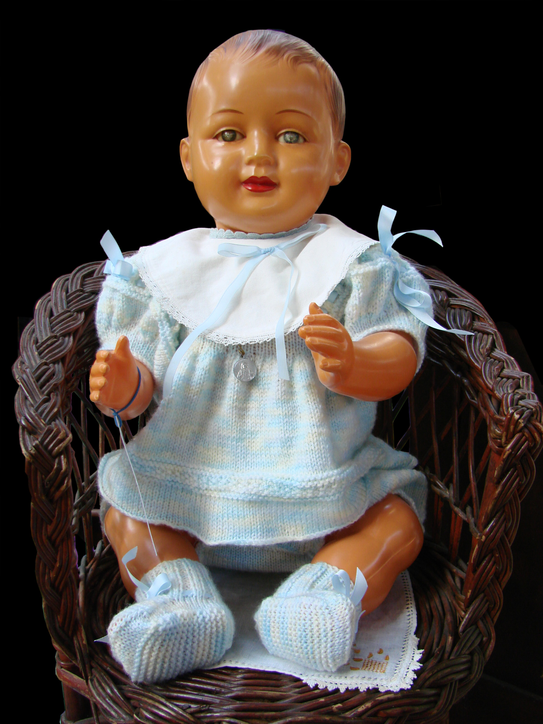 Bébé en celluloïd